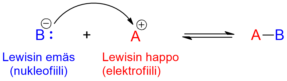 Reaktio, joka kuvaa Lewisin teorian määritelmää haposta ja emäksestä.